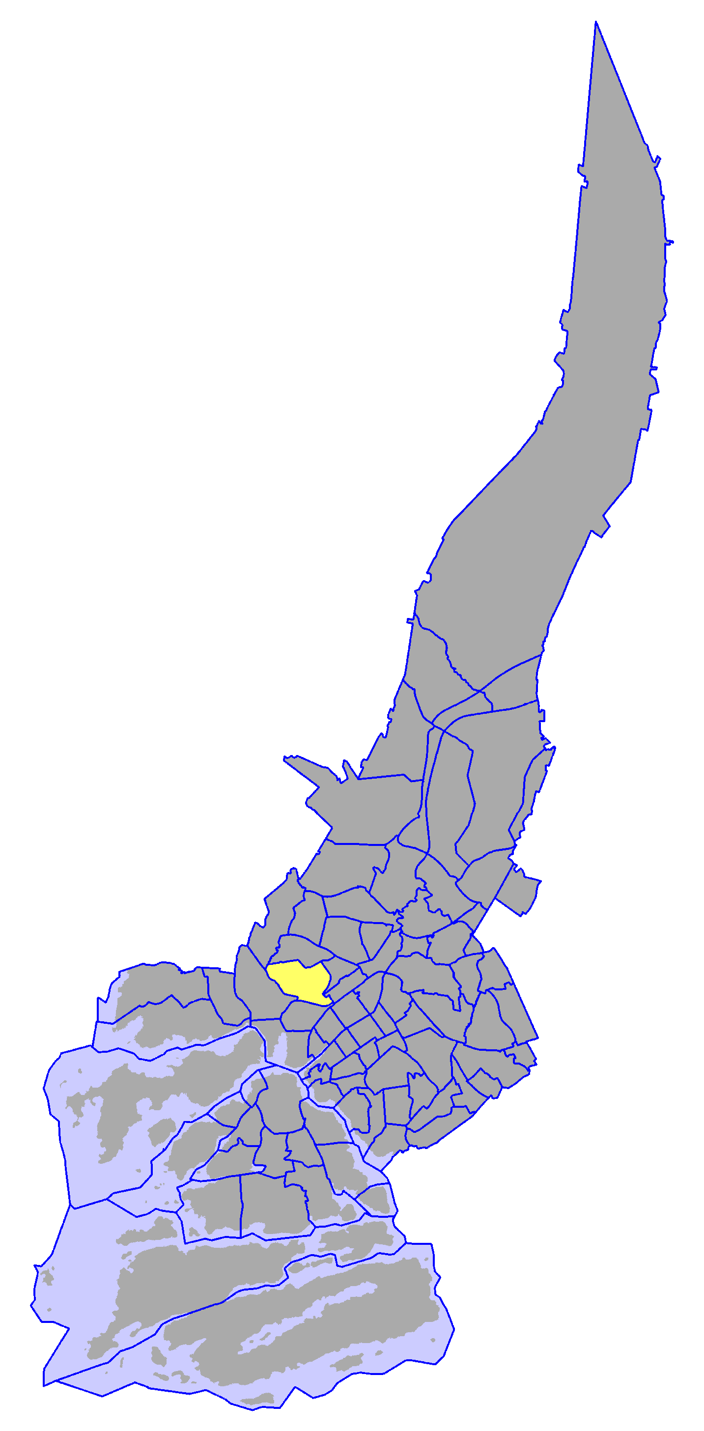 District of Pitkämäki, in Turku